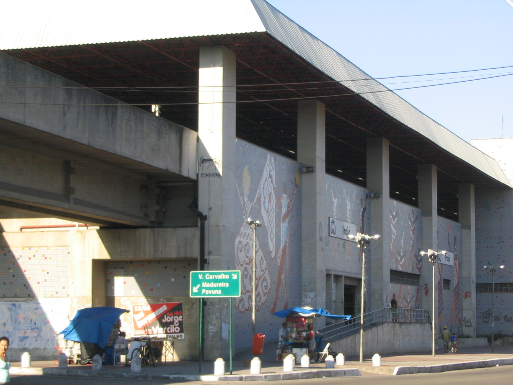 Estação do Metrô, em Irajá. Na Av. Pastor Martin Luther King Junior (antiga Av. Automóvel Clube) Photographer: Nelson Cravo Junior